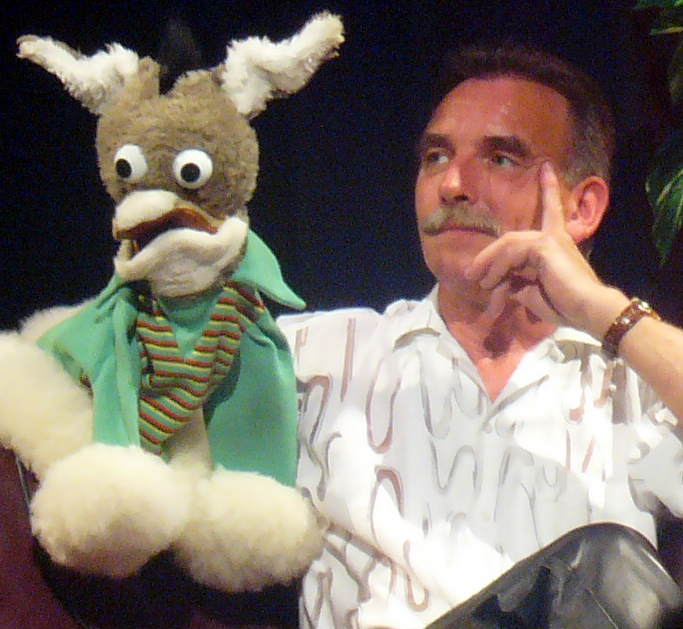 Urs Kliby 2004 in Zurich (Switzerland) with his puppet Caroline